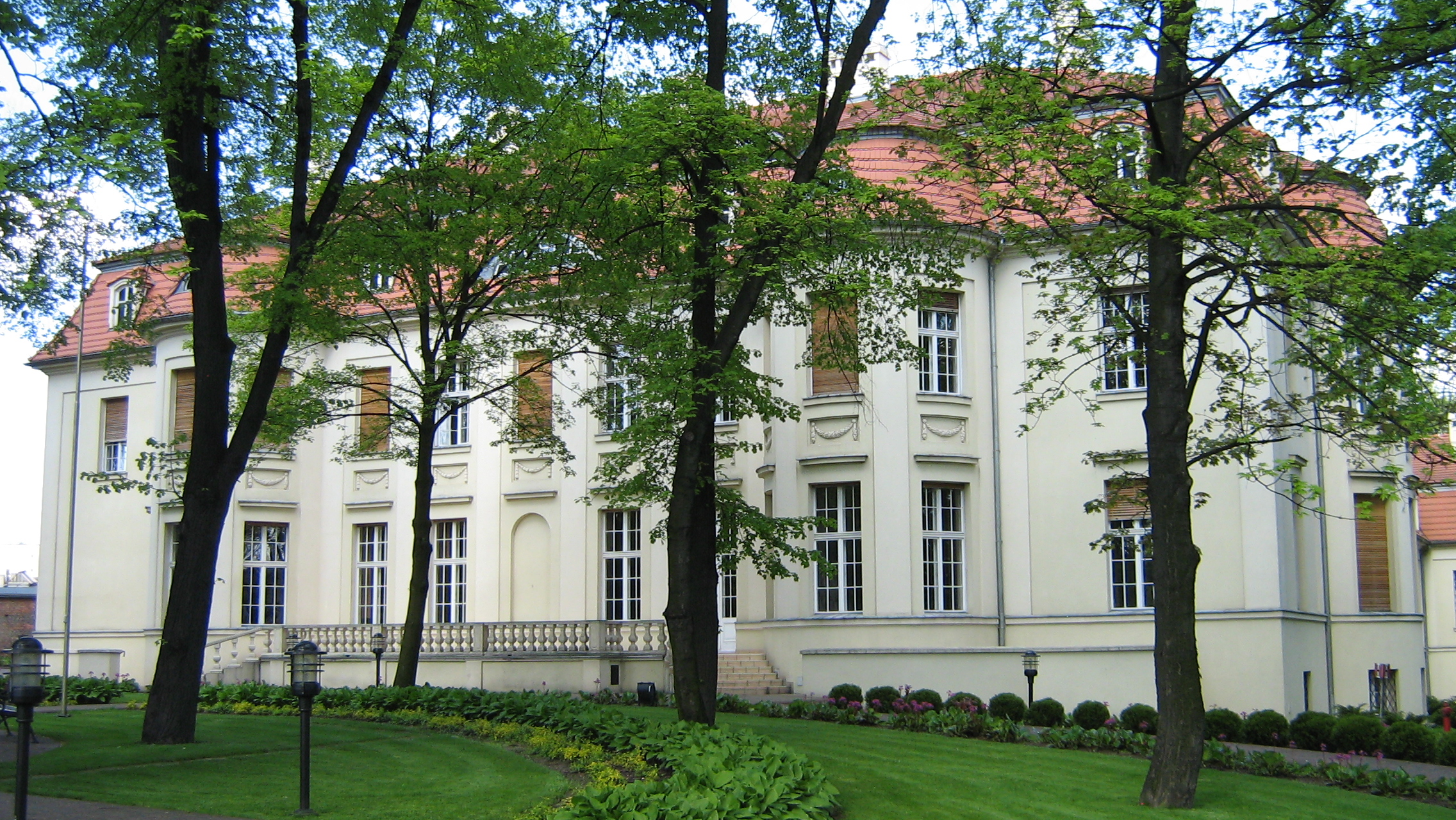 Pałac Alfreda Bidermanna w Łodzi